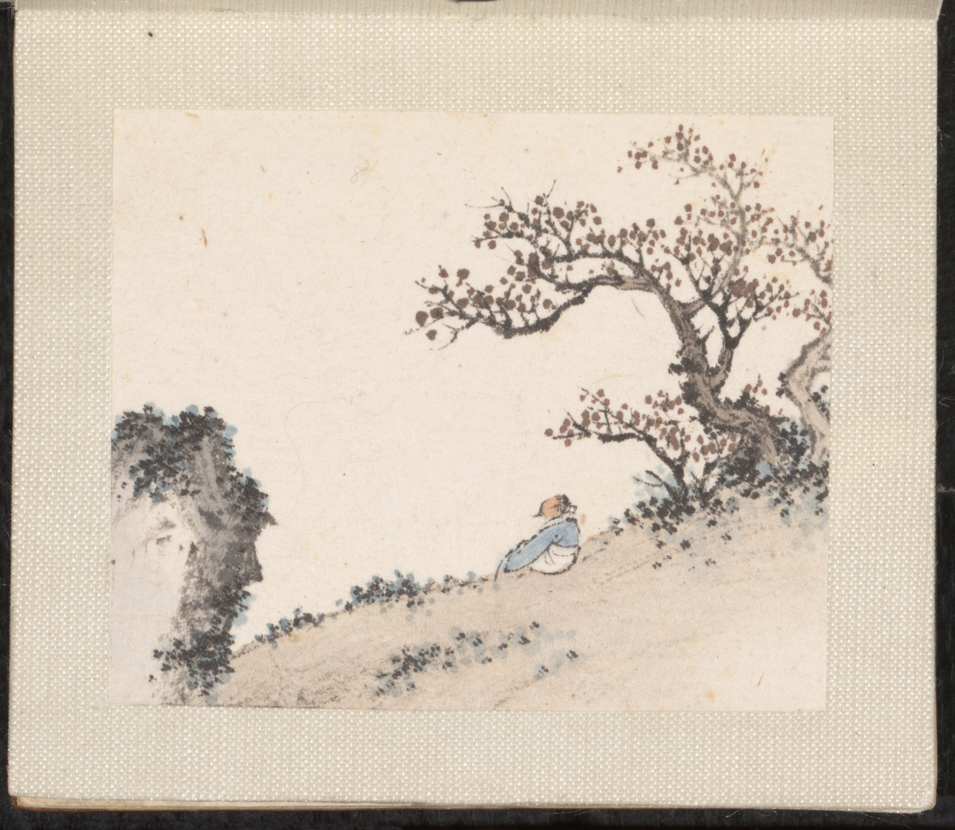 China; Album; Paintings